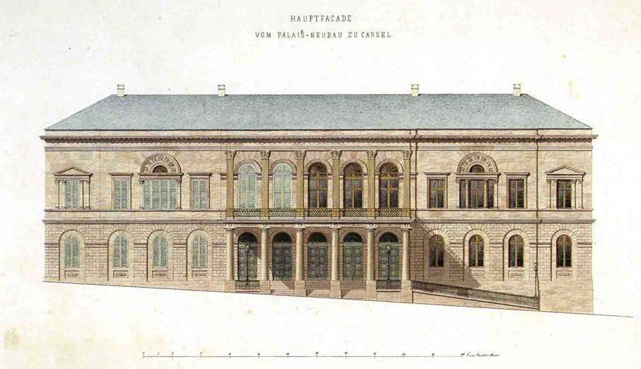 Residenzpalais Kassel, Aufriss der Hauptfassade des Roten Palais